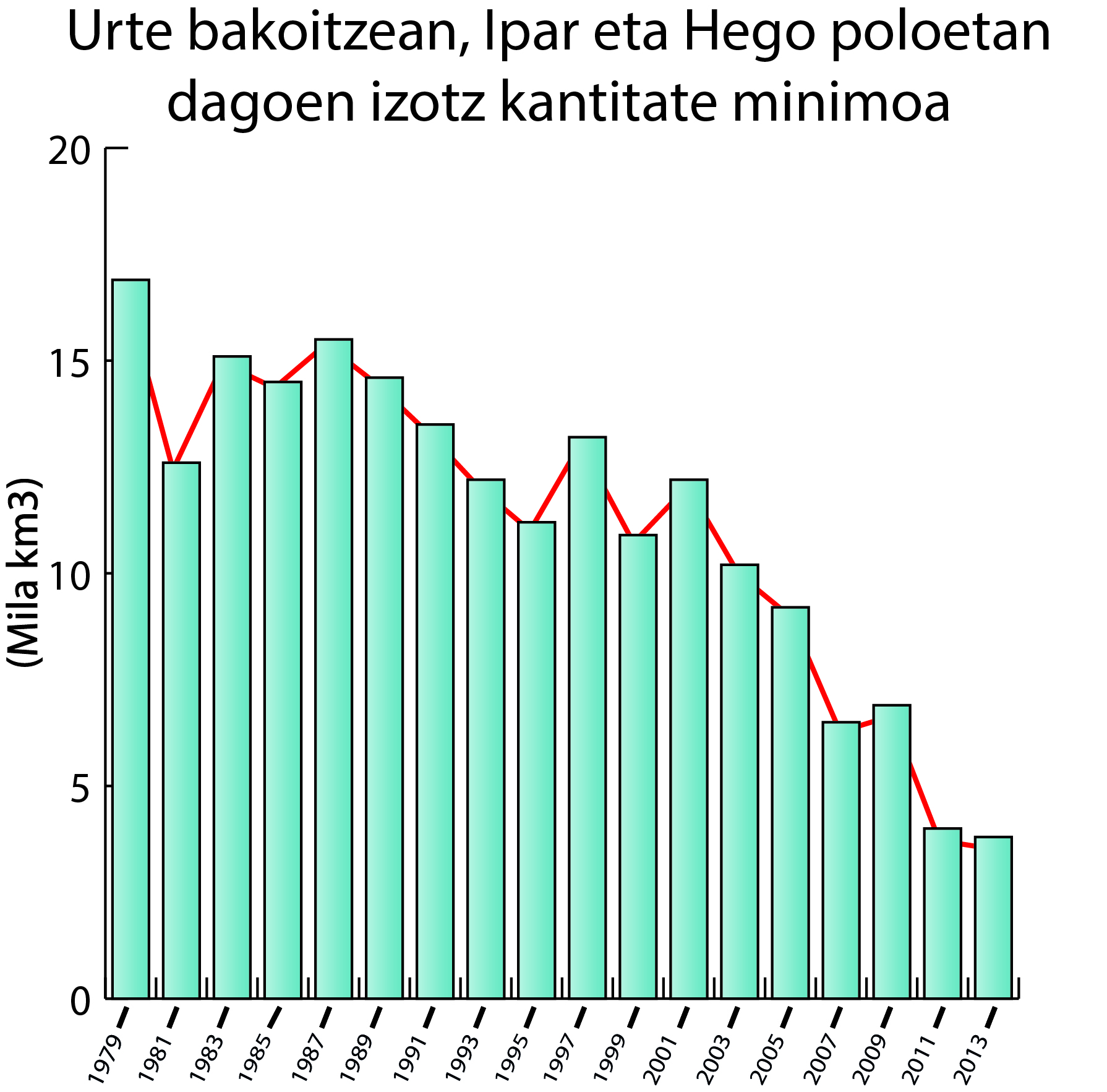 Urte bakoitzean dagoen izotz kantitate minimoa. Urteetan zehar beherakada bat egon dela ikus dezakegu.